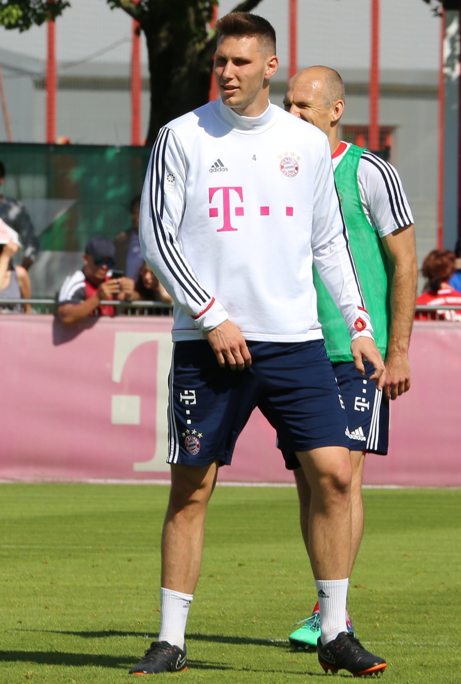 Niklas Süle, am 8. Mai 2018 beim Training auf dem Gelände des FC Bayern München